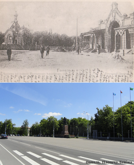 Беларуская (тарашкевіца): г.Гомель. Саборная плошча, капліца ў памяць імператара Аляксандра II і гасцінны двор з гандлёвымі радамі. Сучасная плошча Леніна. Будынкі не захаваліся. This is a photo of Belarusian heritage monument. Reference number: 313В000026 ( WLM)